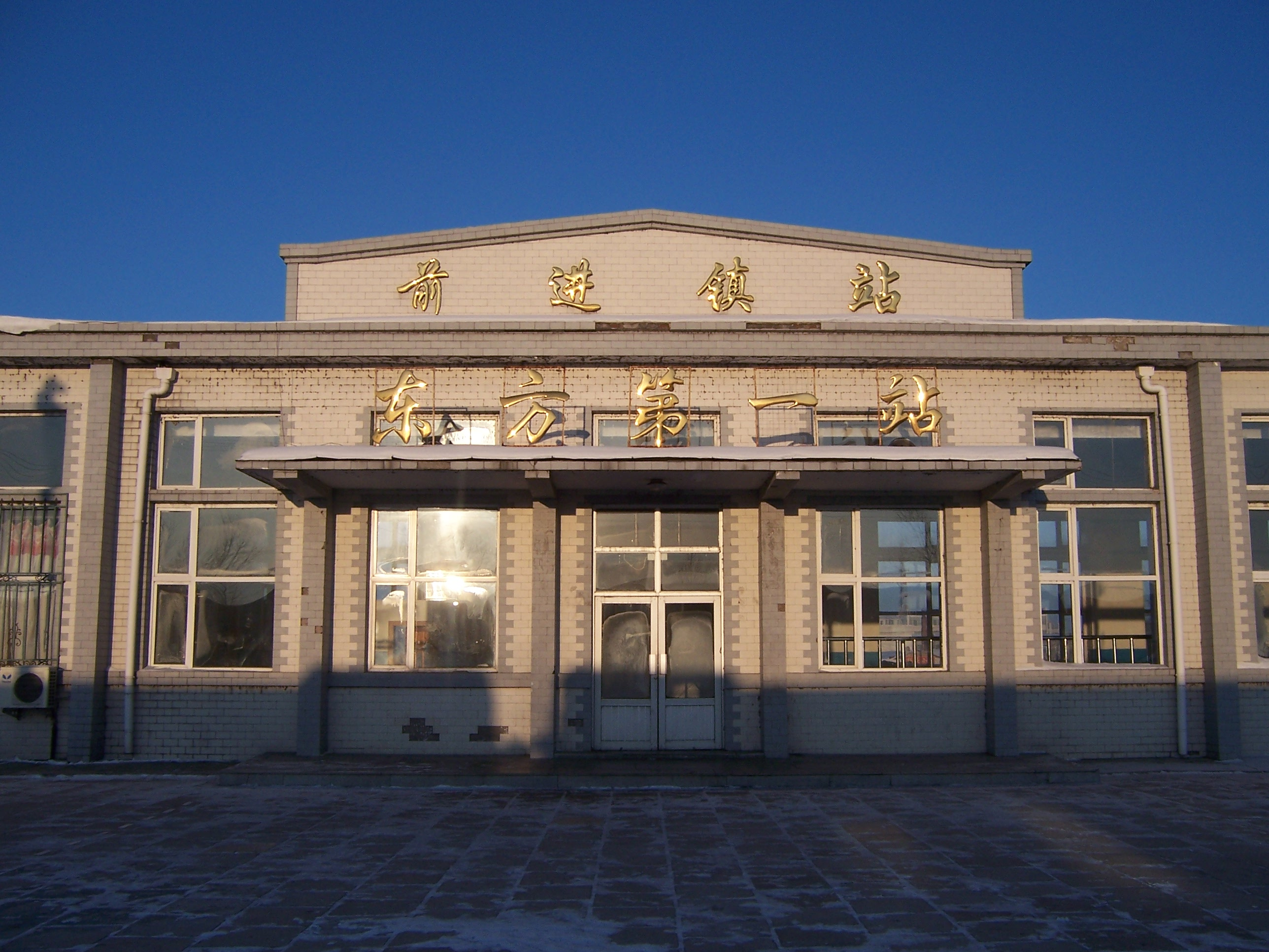 东方第一站